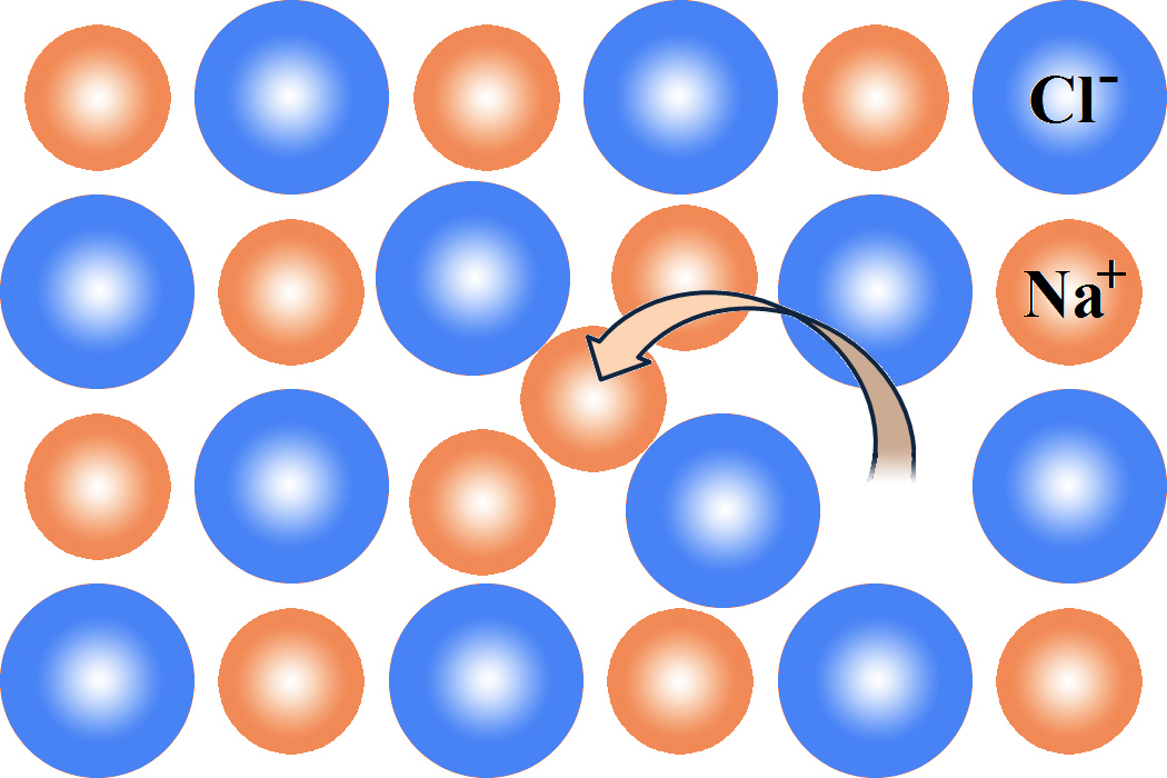 Дефект по Френкелю в кристалле NaCl